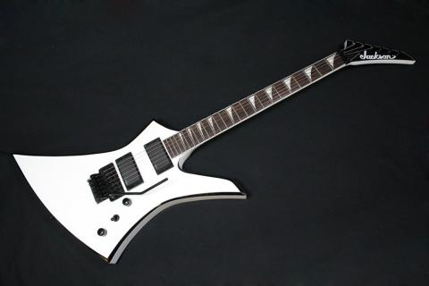 Esta es una tradicional Jackson kelly kexmg